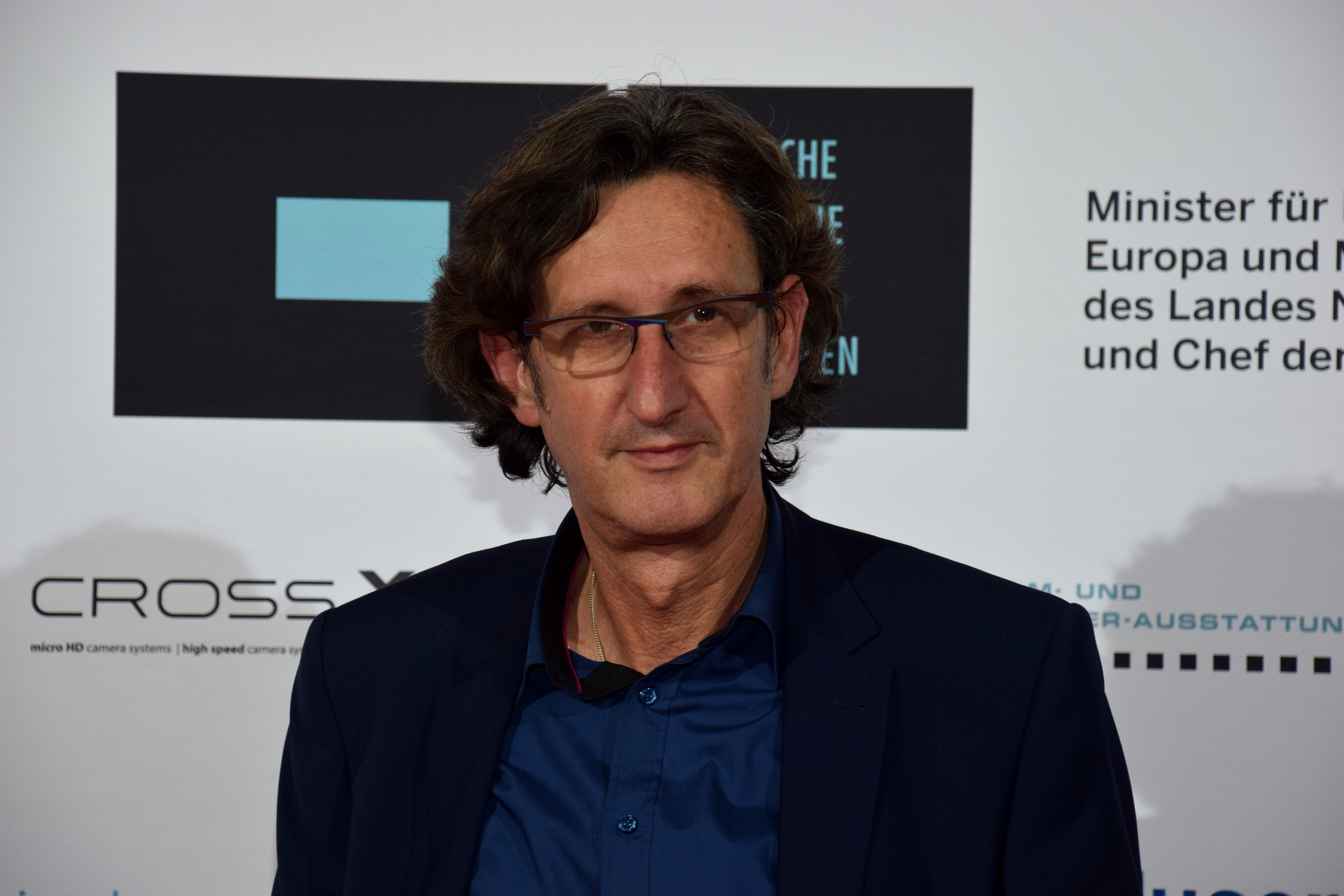 Prof. Dr. Peter Henning Deutsche Akademie für Fernsehen - Symposium und Preisverleihung 2015 in Köln